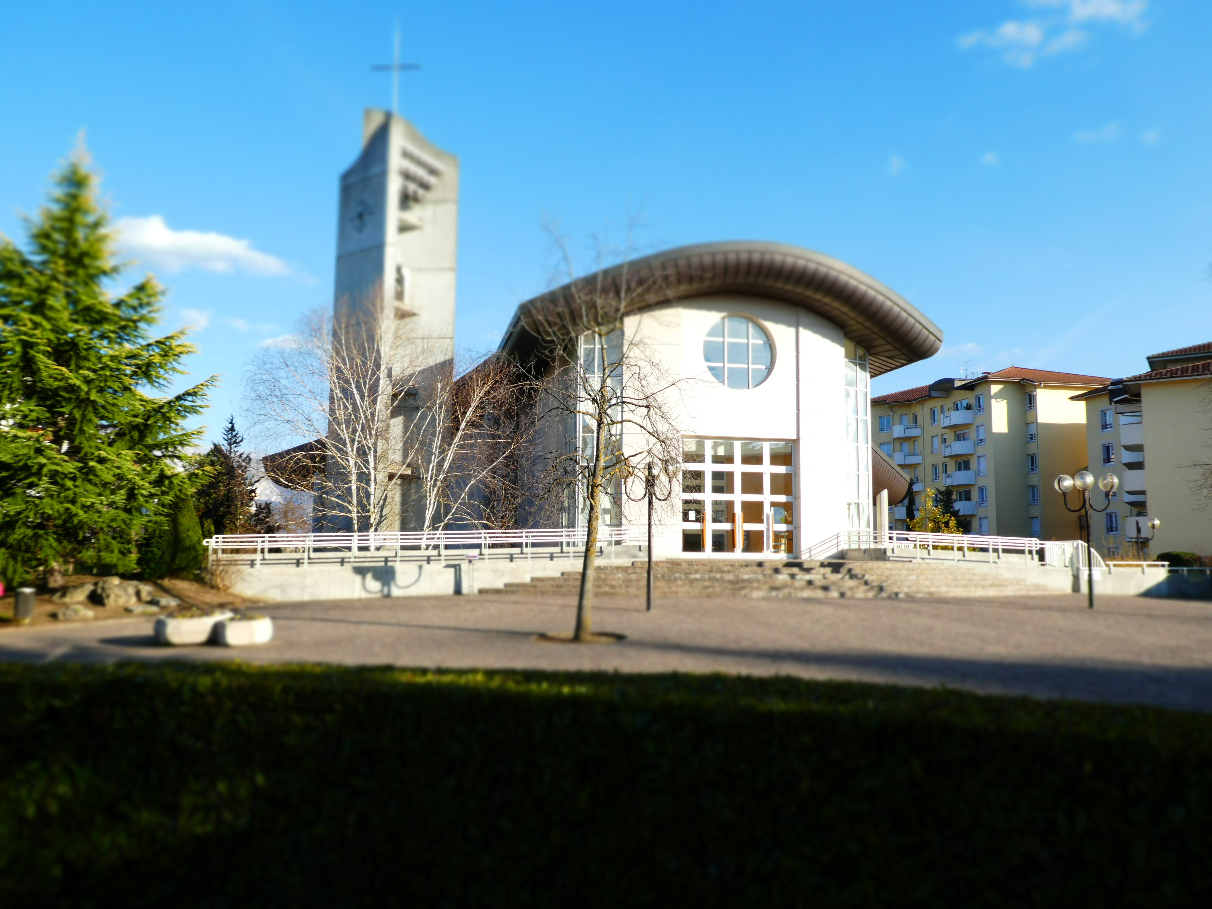 vue du parvis de l'église Saint Paul